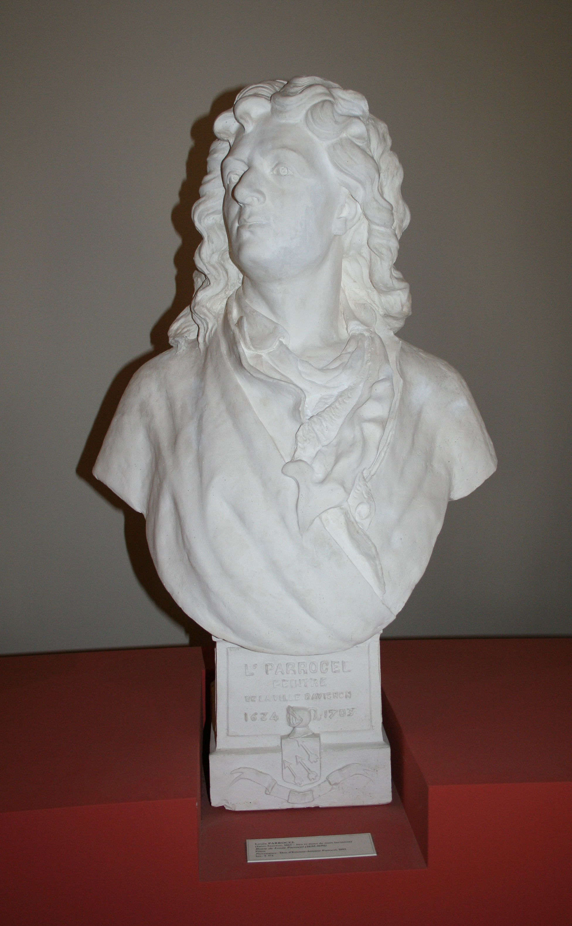 Buste de Louis Parrocel (1634-1694) au musée Calvet d'Avignon. Sculpture d'un autre Louis Parrocel(1865-?)